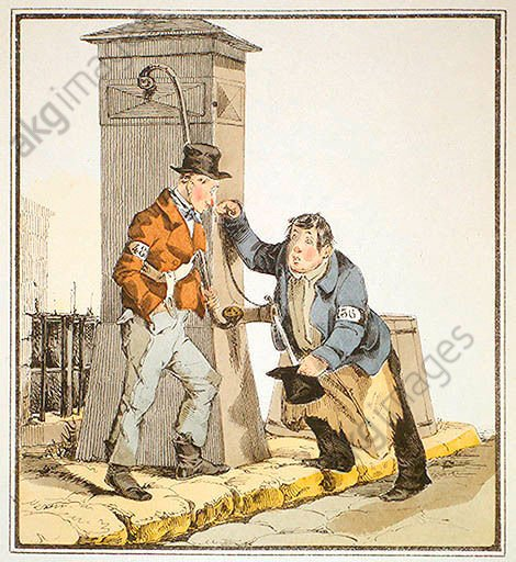 Nante am BrunnenDörbeck